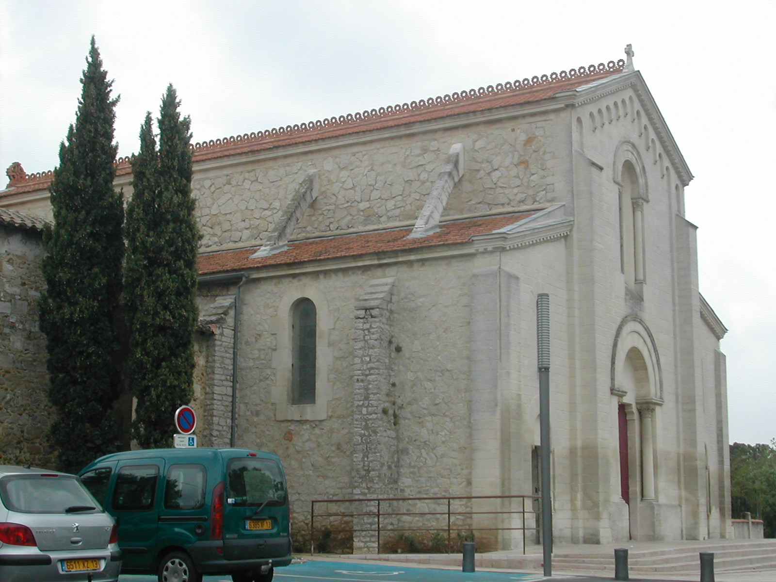 Eglise de Saint-Martin de Crau.43°38′13″N 4°48′23.2″E / 43.63694°N 4.806444°E